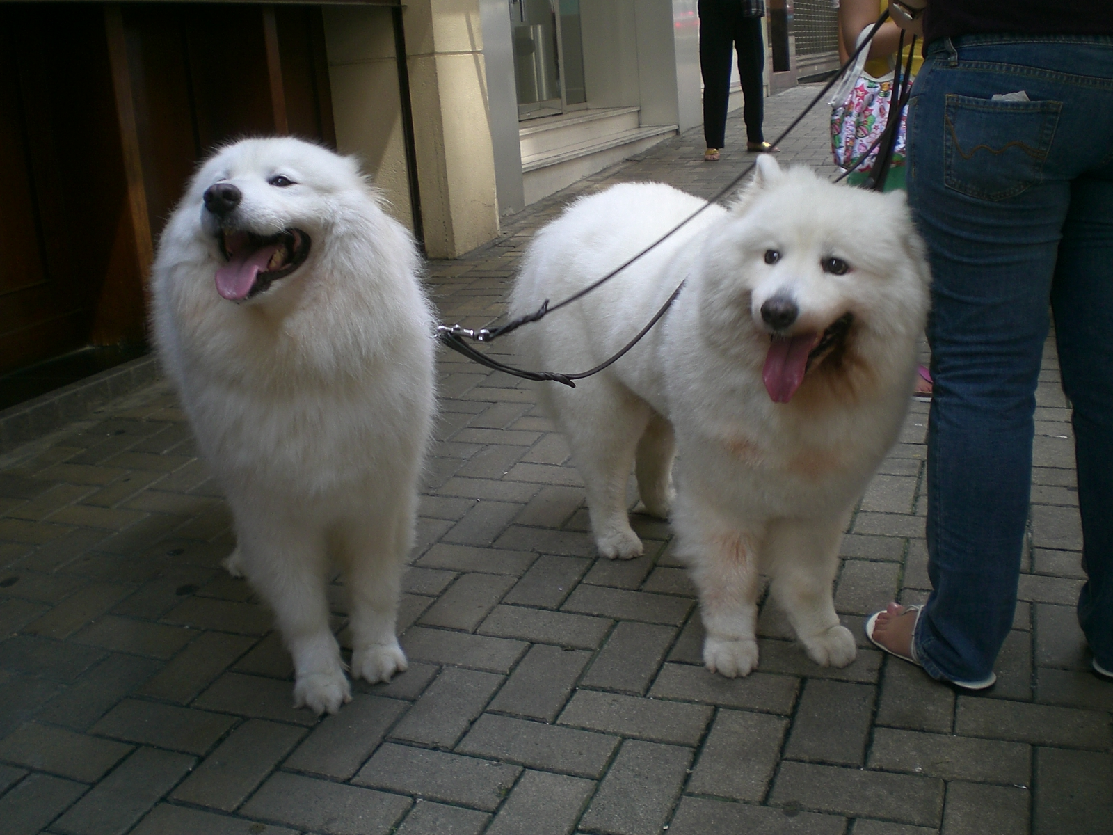 中文（香港）: 跑馬地景光街。